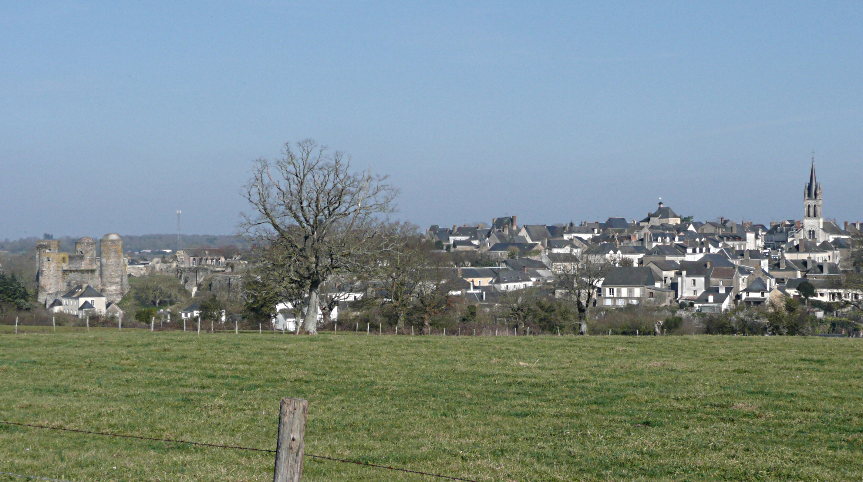 Vue générale de la ville de Pouancé, Maine-et-Loire